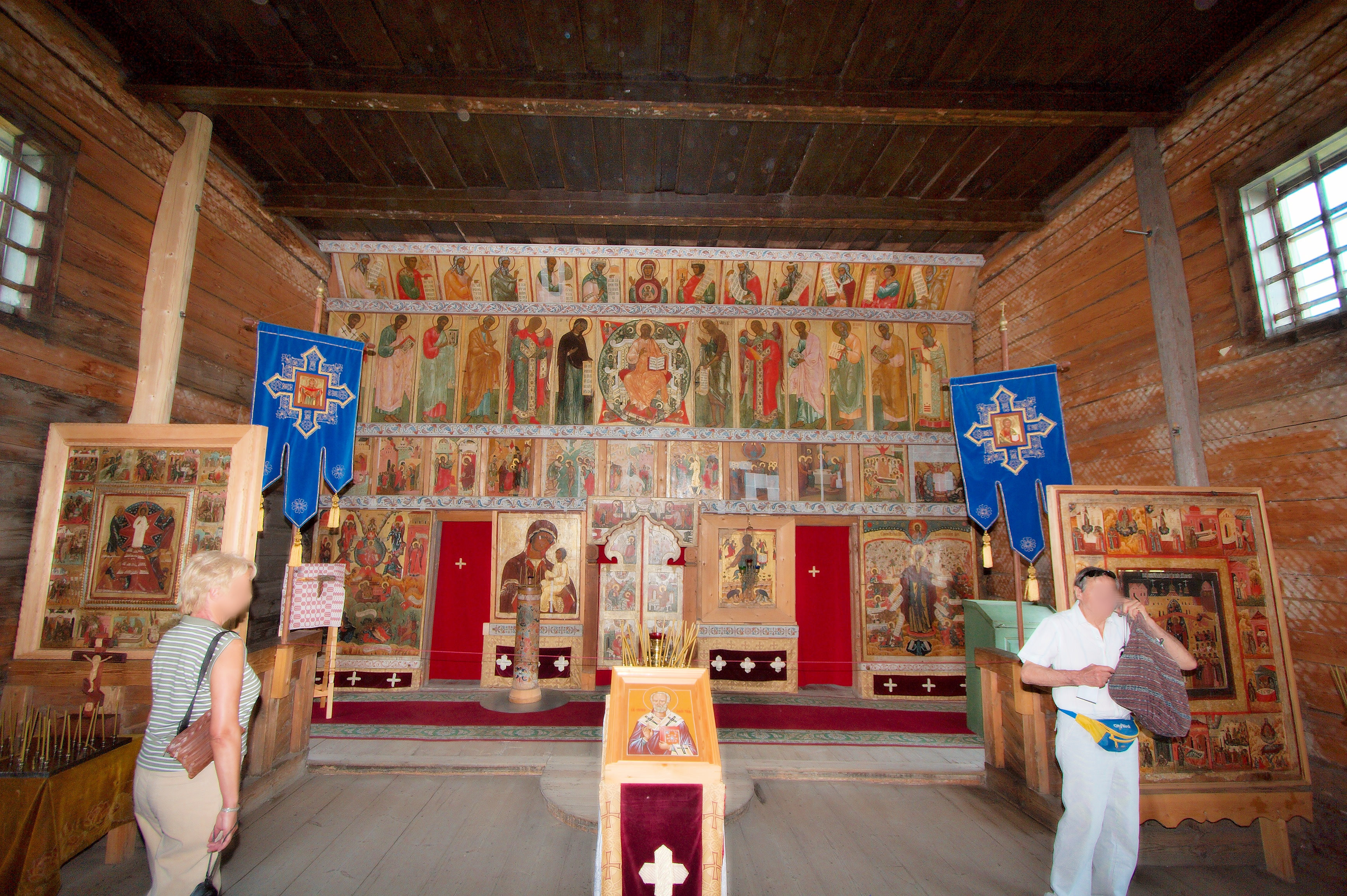 Интерьер церкви.